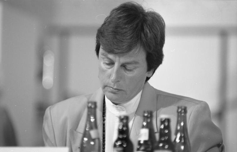 30.8.-2.9.1988 SPD-Parteitag in Münster, Halle Münsterland